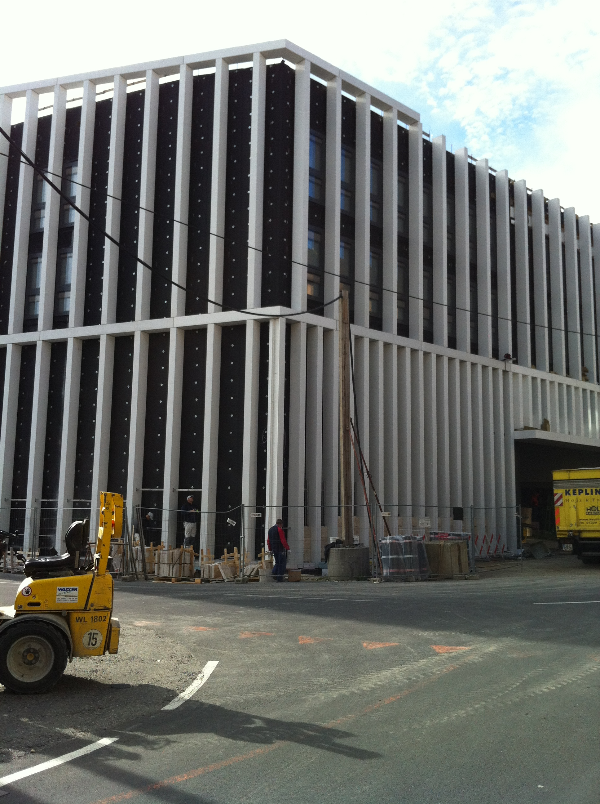 Musiktheater Linz von der Blumauerstraße aus aufgenommen. Es befindet sich derzeit noch im Bau.